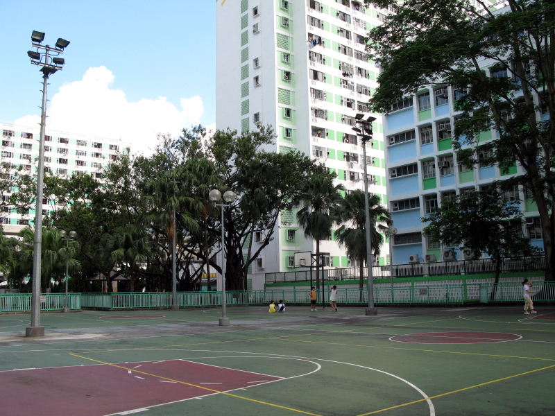 Lek Yuen Estate Basketball Court